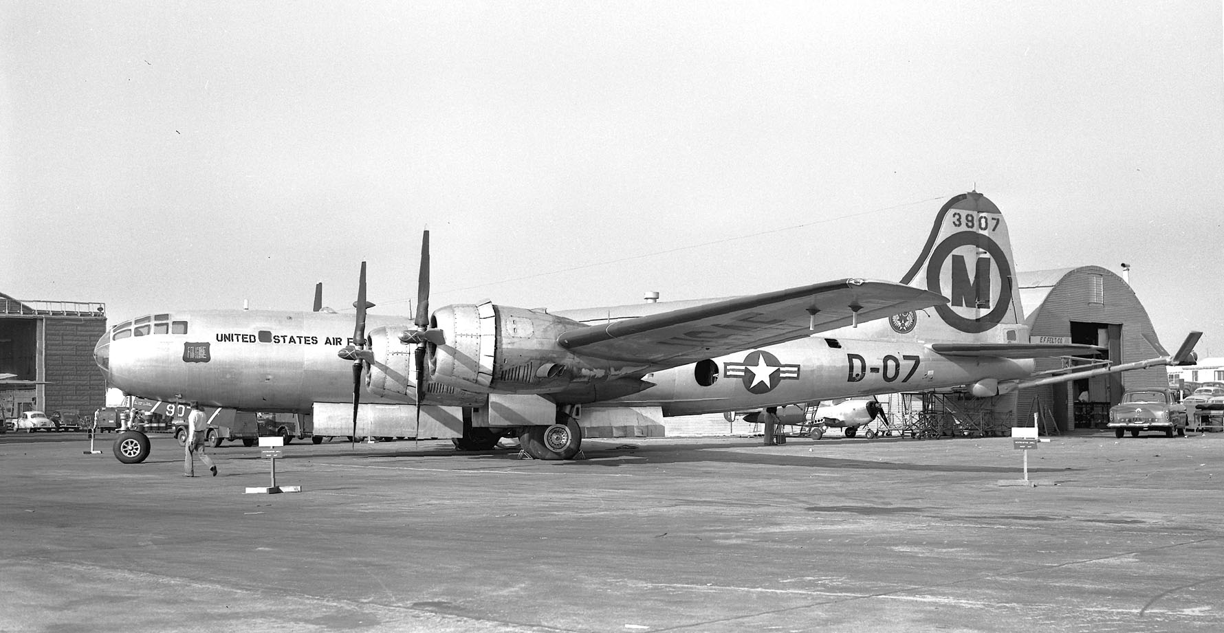 Oakland Airport 1952